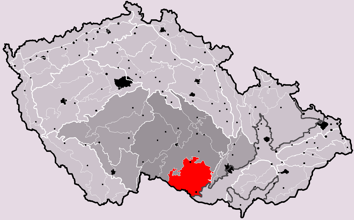 Poloha geomorfologického celku Jevišovická pahorkatina v rámci České republiky. Hercynský systém Hercynská pohoří I Česká vysočina I2 (II) Česko-moravská subprovincie I2C (IIC) Českomoravská vrchovina I2C-7 (IIC-7) Jevišovická pahorkatina